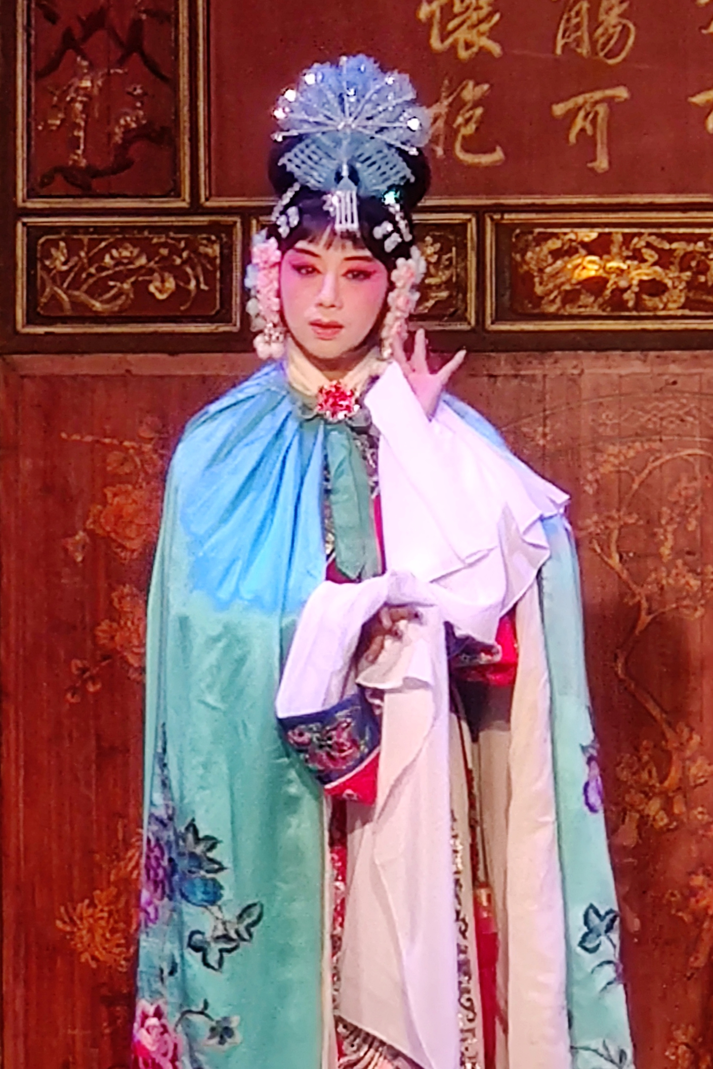 中文（中国大陆）: 西施——林爱娜